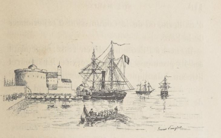 L'aviso le Narval, à Civita-Vecchia en août 1849 ; gravure d' Ernest Langlois et Ginos in Nos marins : vice-amiraux, contre-amiraux, officiers généraux des troupes de la marine et des corps entretenus d' Étienne Tréfeu 1888 (BNF/Gallica)